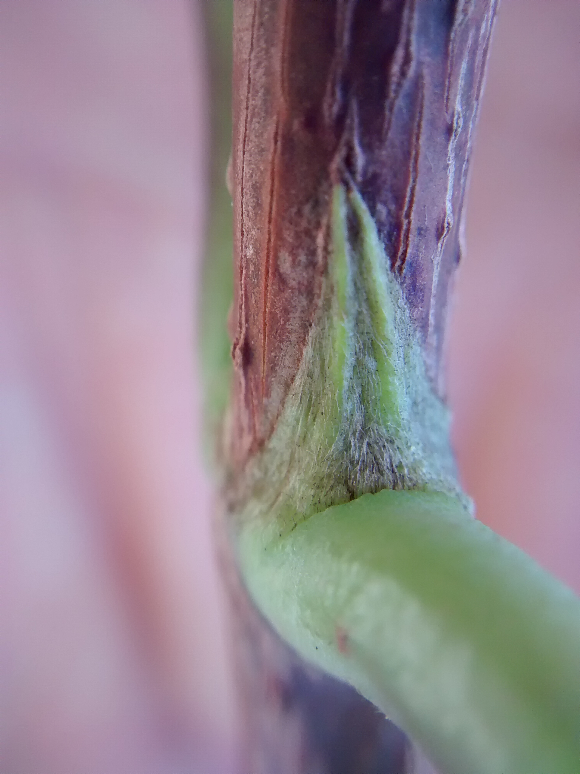 Estípula de Lophanthera lactescens.